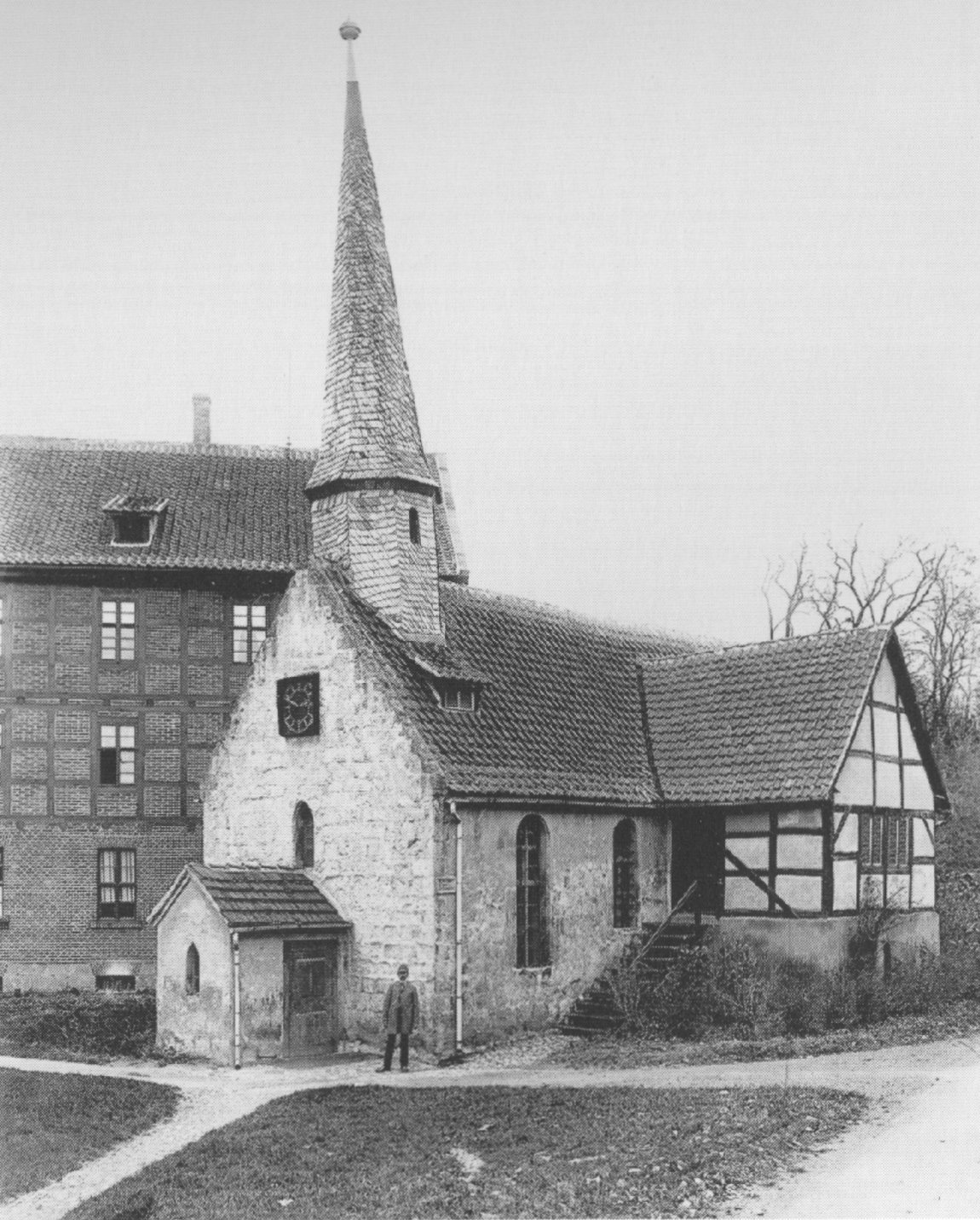 Johanniskapelle, Quedlinburg um 1900